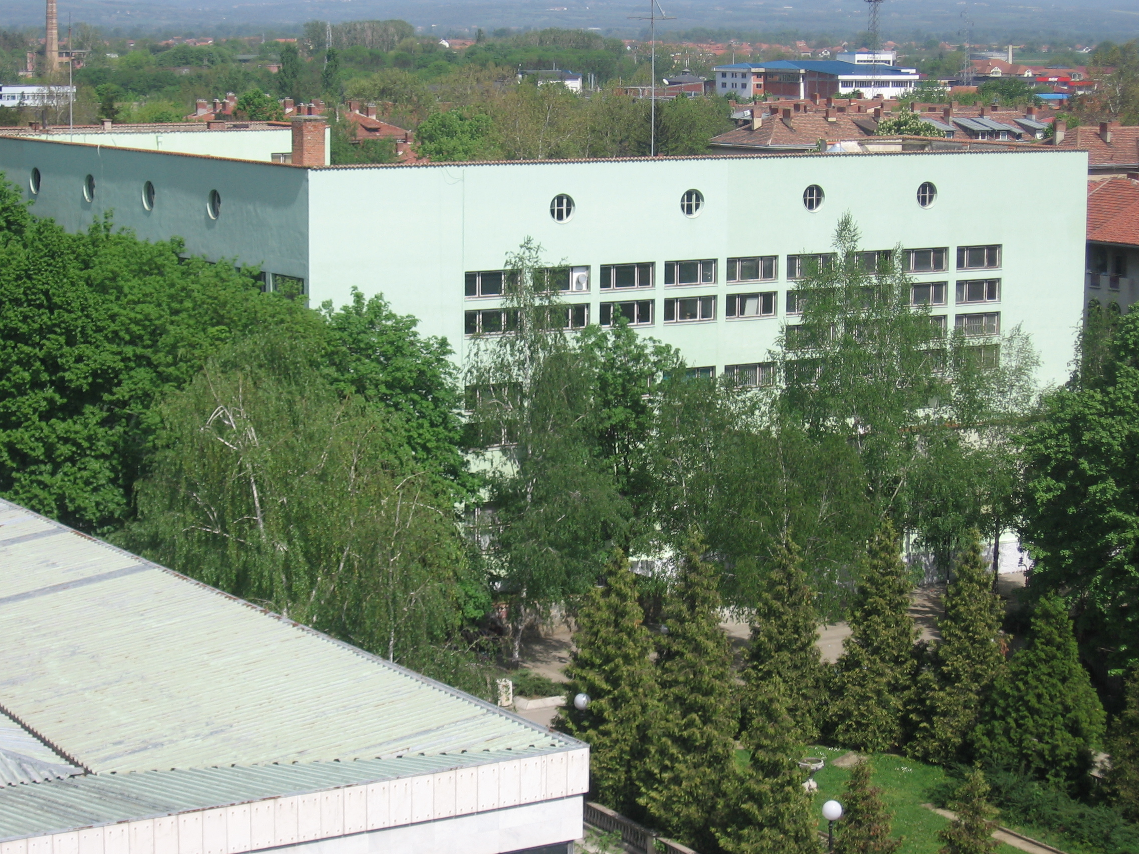 Gimnazija Svetozar Marković